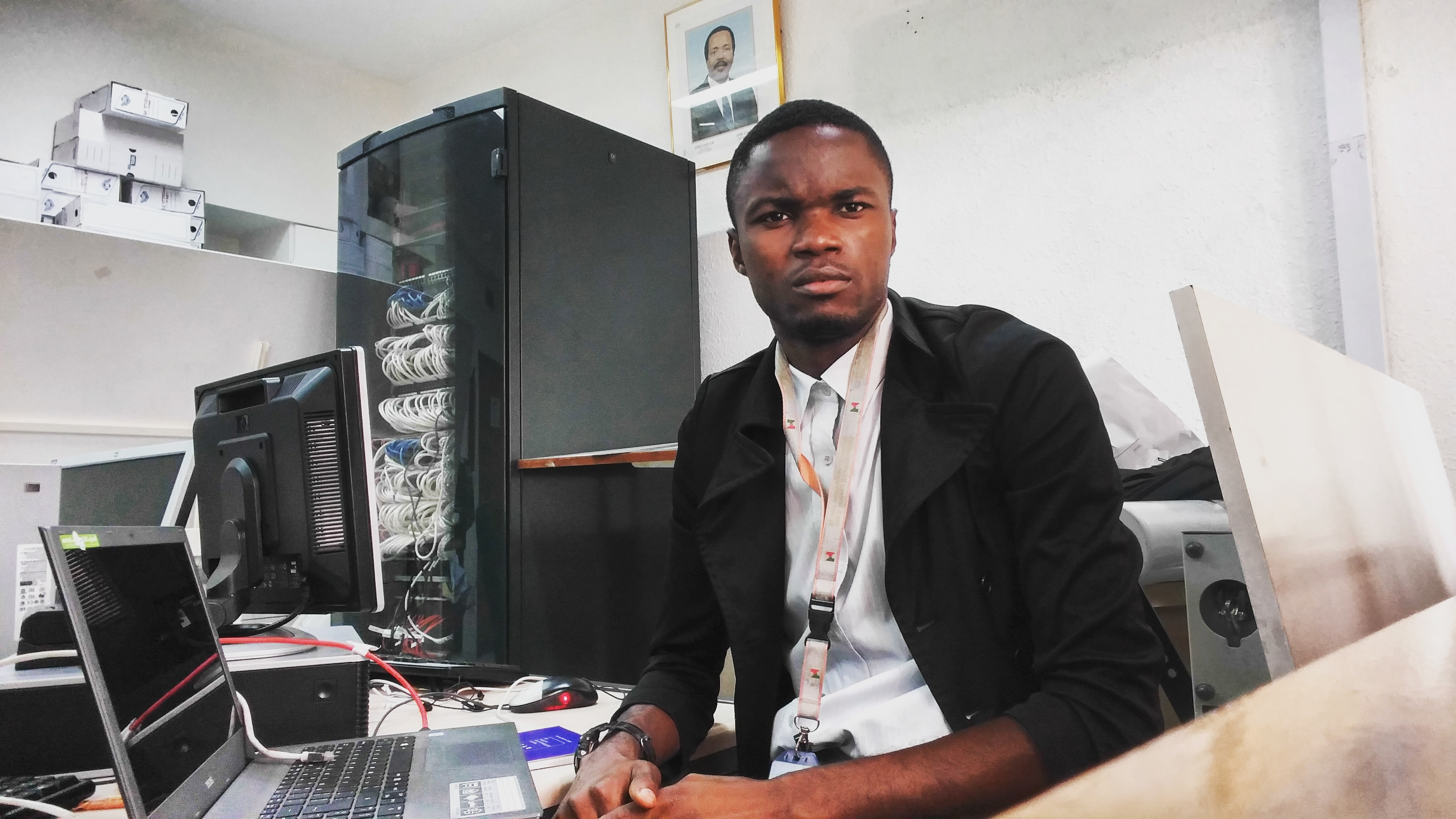 Ingenieur reseaux This is an image of "African people at work" from Cameroon